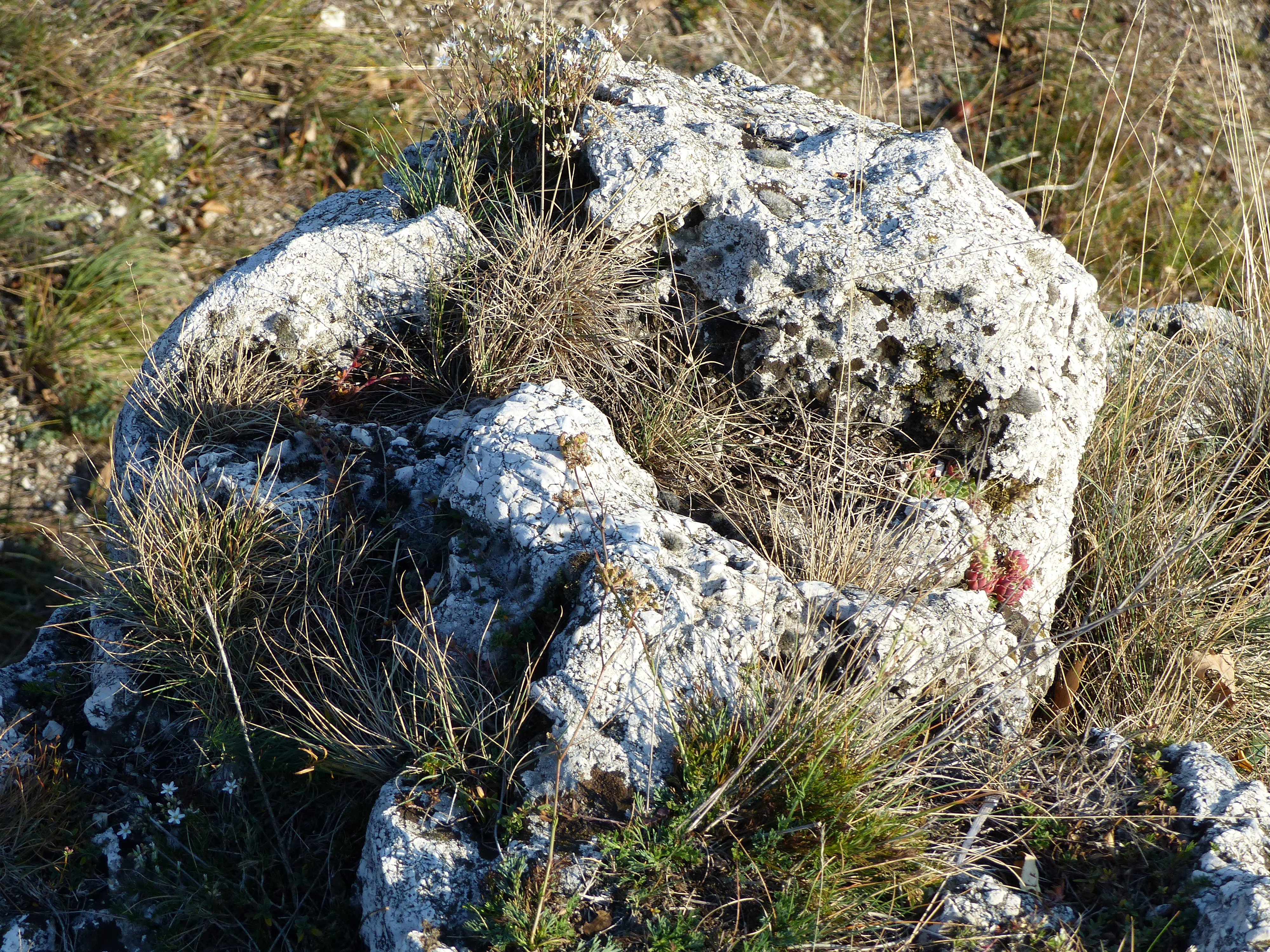 A felvétel 2017. október 19-én csütörtökön készült Budaörsön, az Esthajnal utca déli végénél. Sziklagyep.